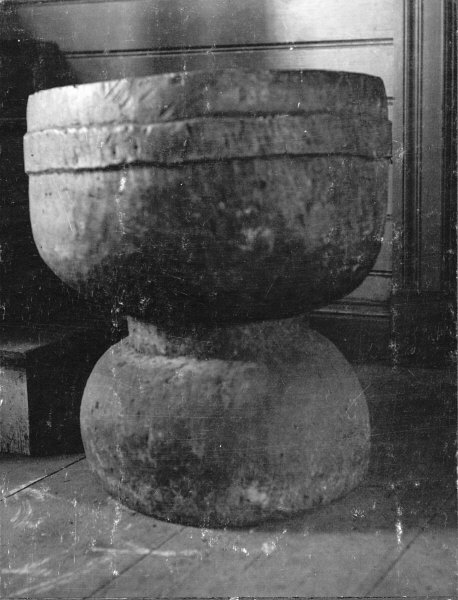 Dopfunt av täljsten. Kategori: (04) DopfuntarDopfunt av täljsten.